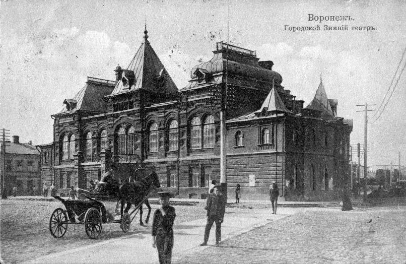 Воронежский публичный, (ныне драматический театр имени А. Кольцова)